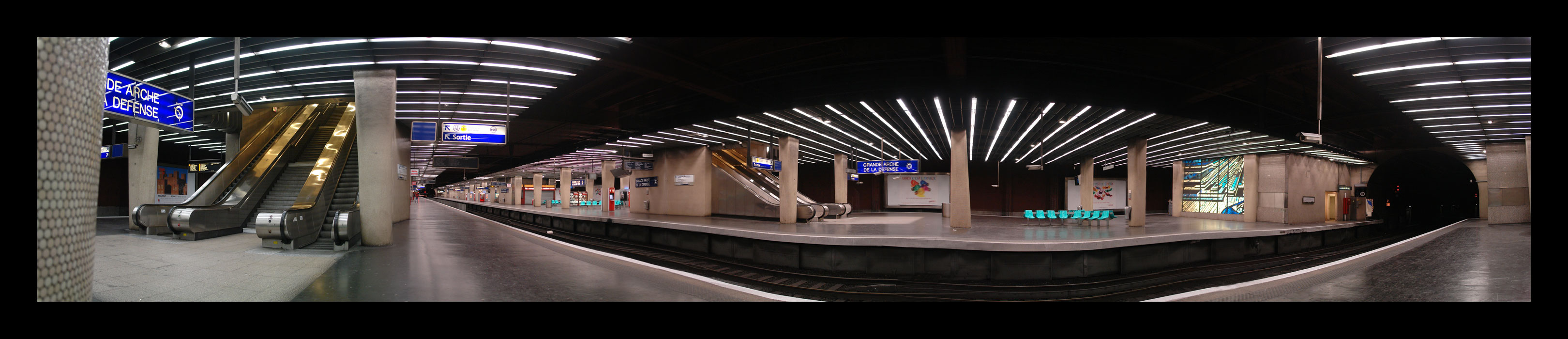 Panorama horizontal de la gare RER de la Défense à Paris - Photo de Pascal Fernandez